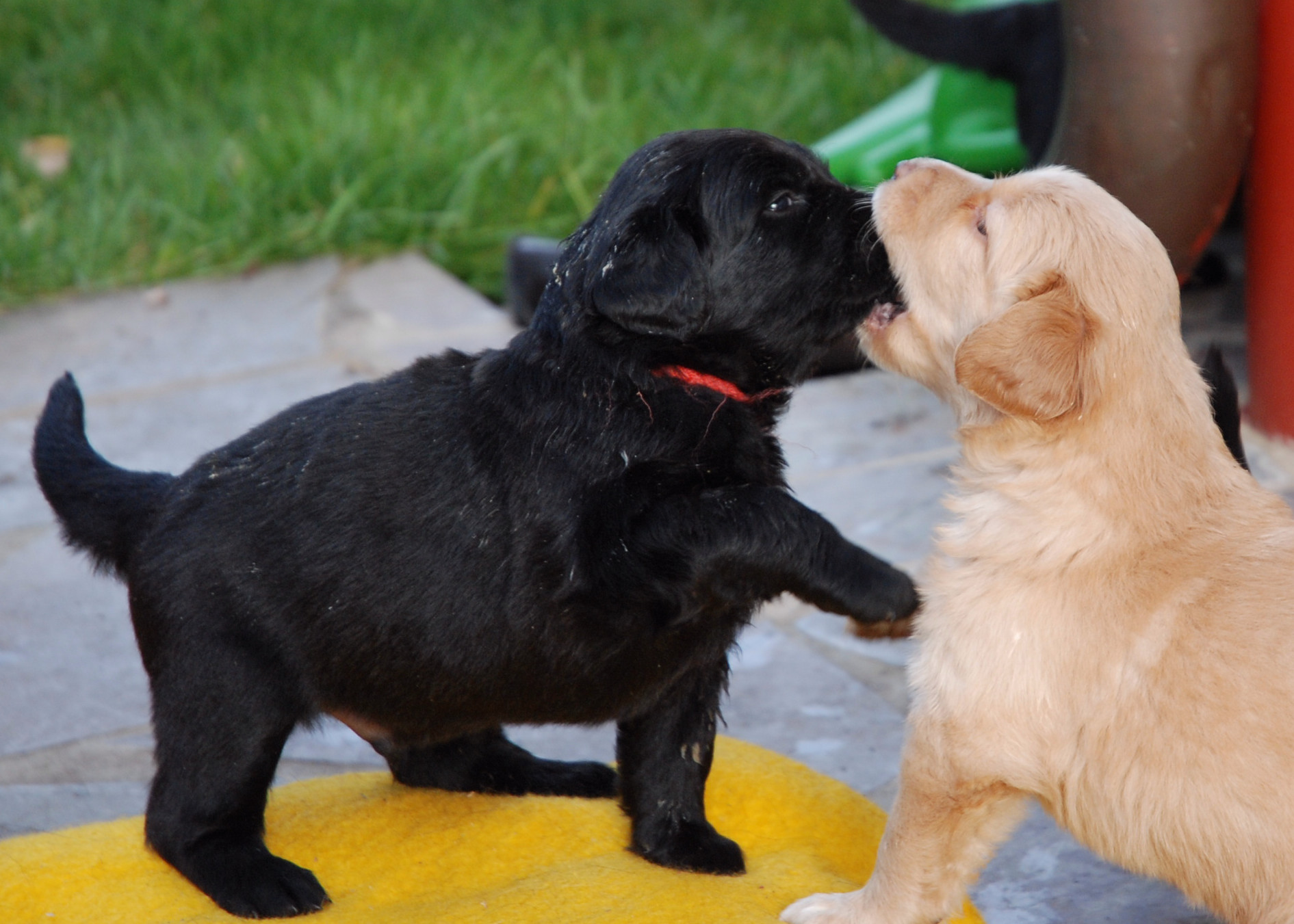 4 weeks old hovawart puppies